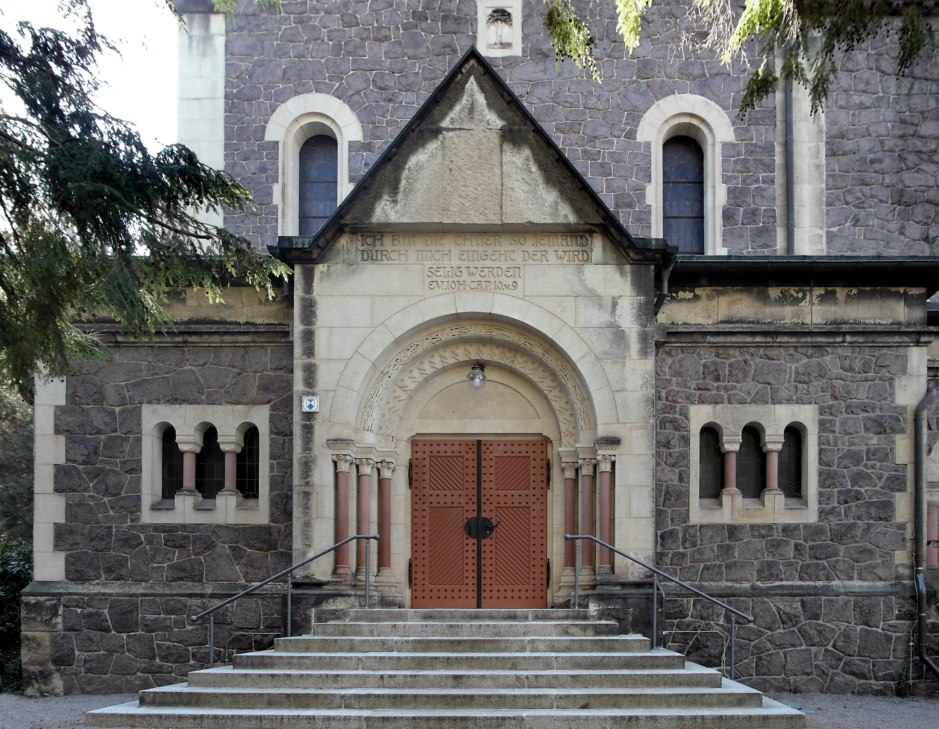 18.02.2019 01705 Freital-Hainsberg, Kirchstraße 10 (GMP: 50.980621,13.633523): Hoffnungskirche Freital bzw. Hainsberger Kirche, erbaut 1900 - 1901 nach Plänen des Architekten Paul Reuter aus Bruchsteinmauerwerk mit Sandsteingewänden im Stile der Neoromanik. Eingangsfassade im Nordosten. [SAM9564.JPG]20190218215DR.JPG(c)Blobelt